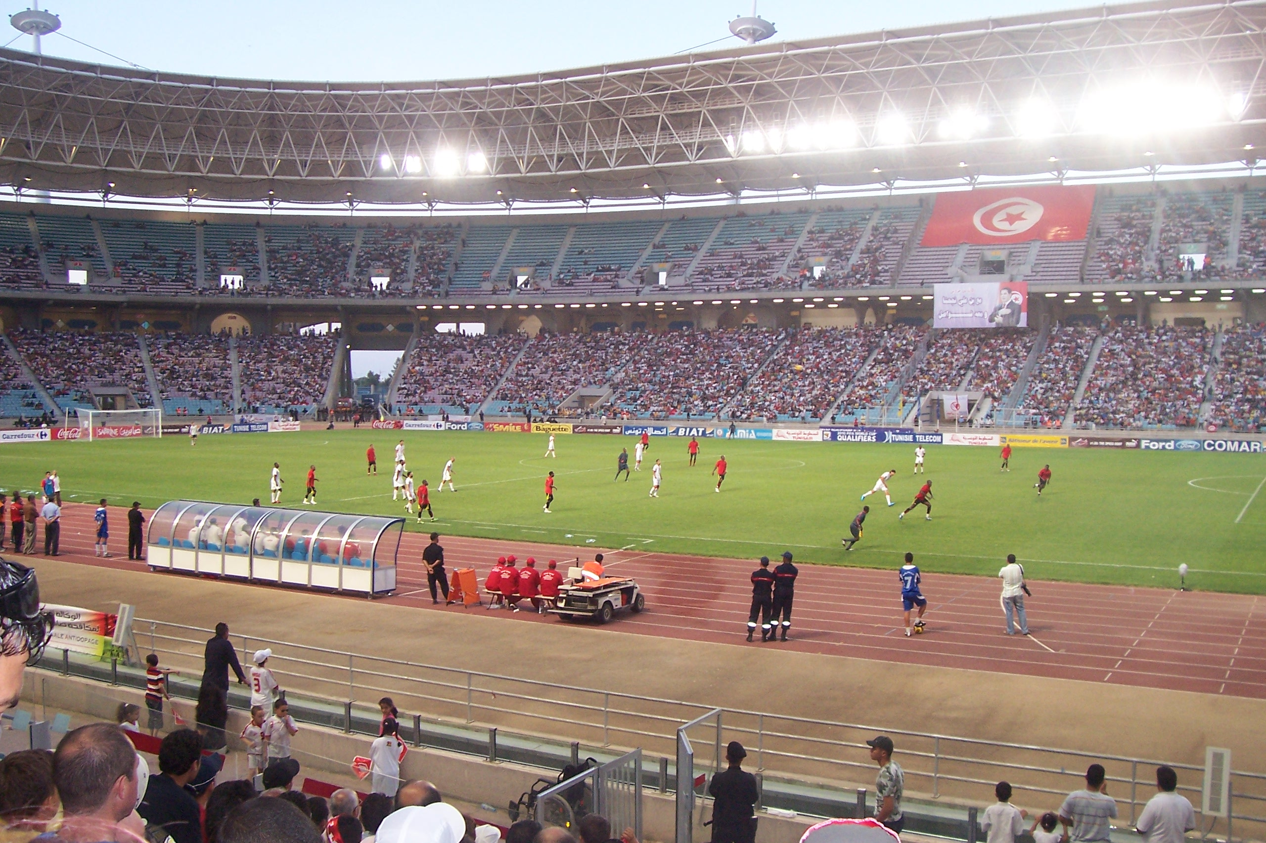 Match entre les équipes du Mozambique et de Tunisie au stade de Radès (Tunisie)